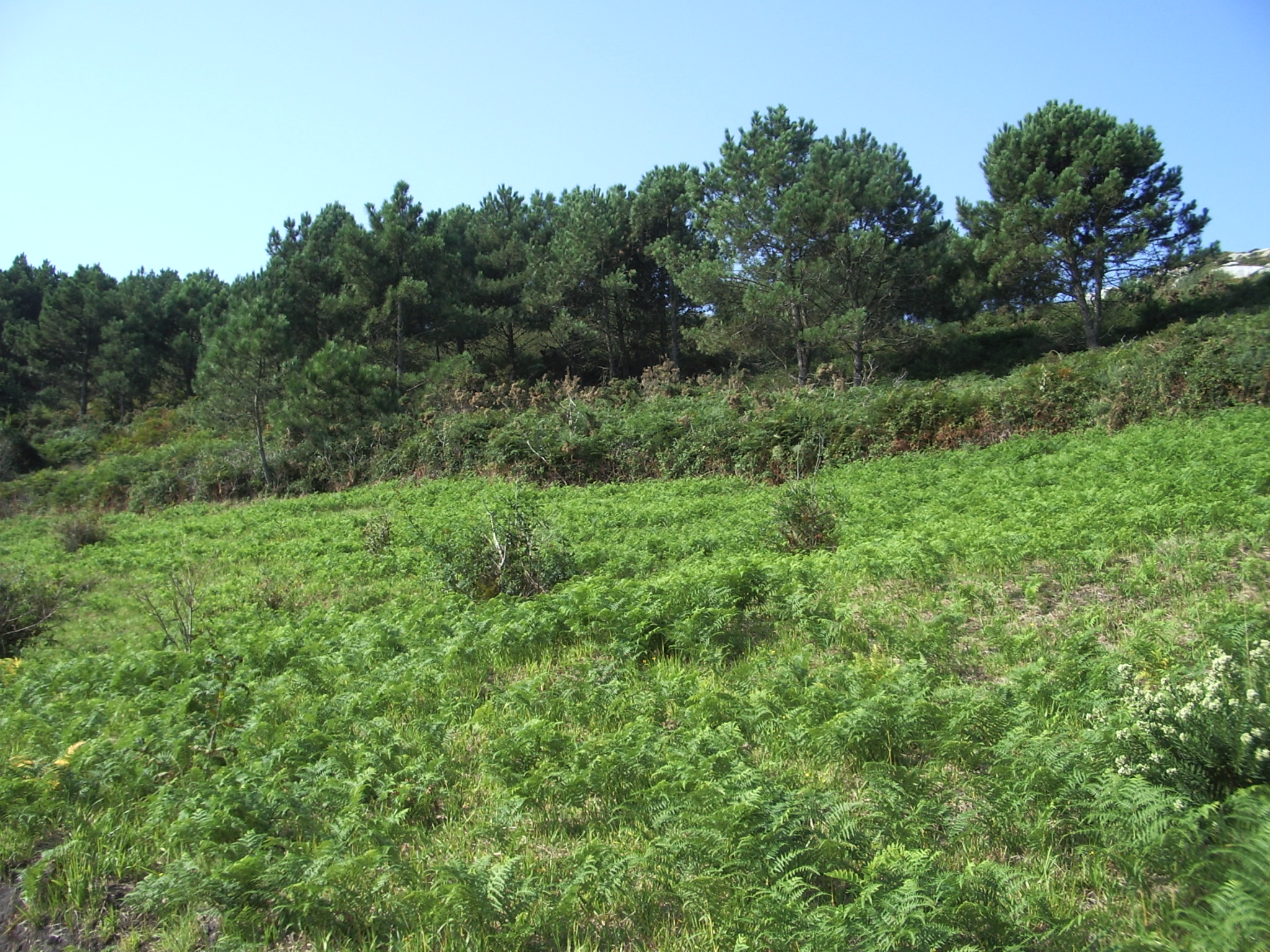 Paisaje. Tipo de vegetación en las Islas Cíes (Galicia).